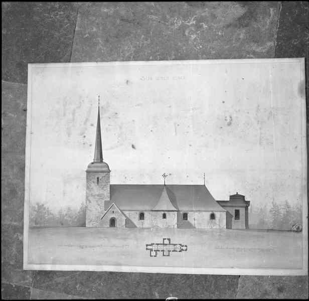 Kyrkan mot norr. Före ombyggnaden på 1840-talet. Foto av teckning. Kategori: (01) ExteriörerKyrkan mot norr. Före ombyggnaden på 1840-talet. Foto av teckning.